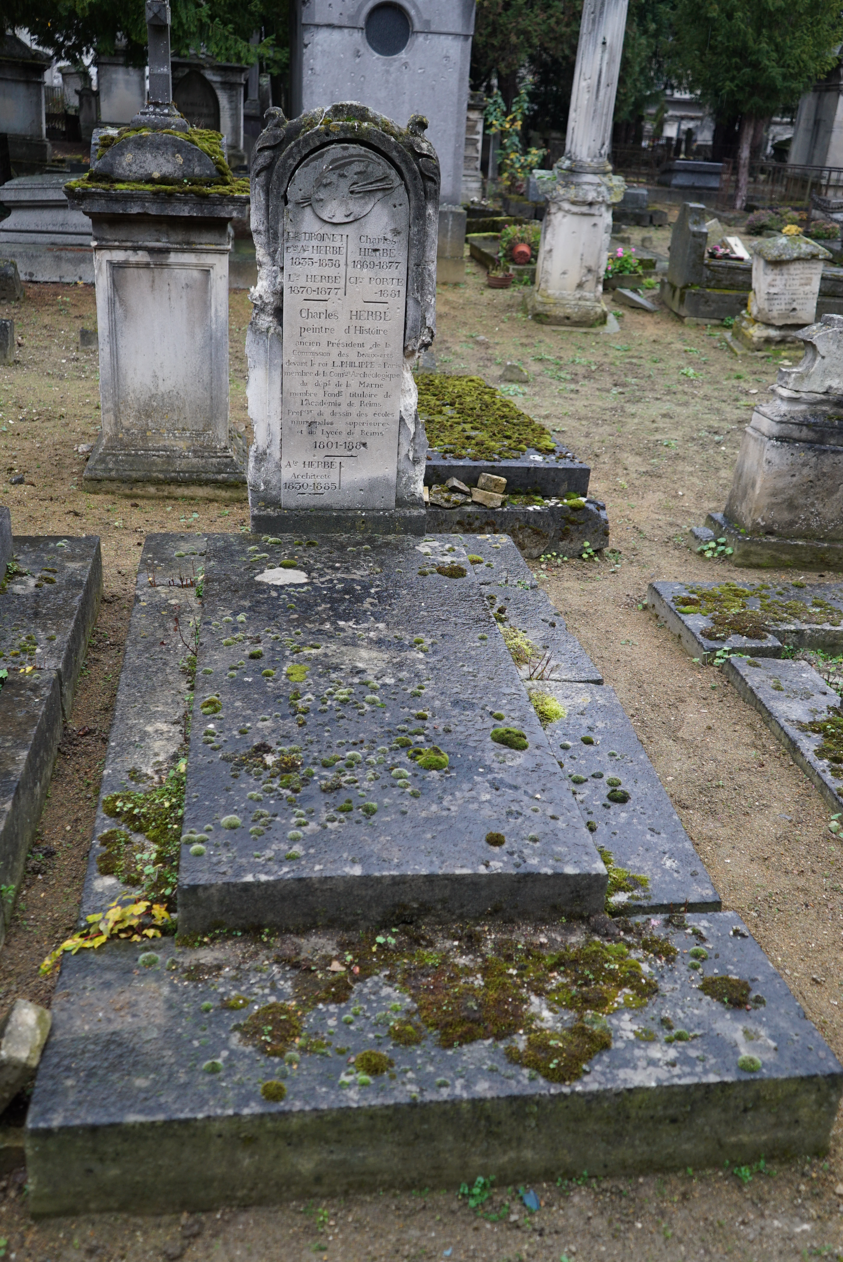 tombe de Charles Herbé, canton 7.